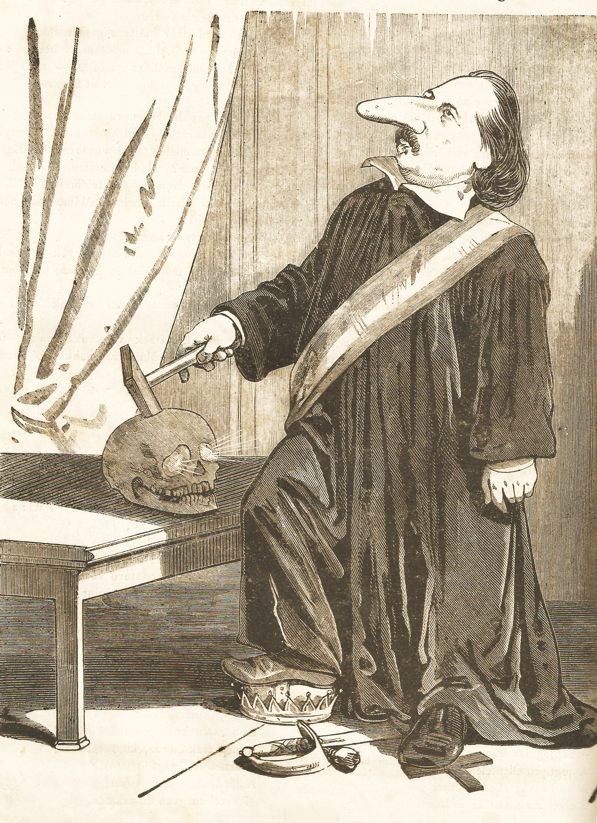 Pulszky Ferenc (1814 - 1897) szabadkőműves nagymester karikatúrája